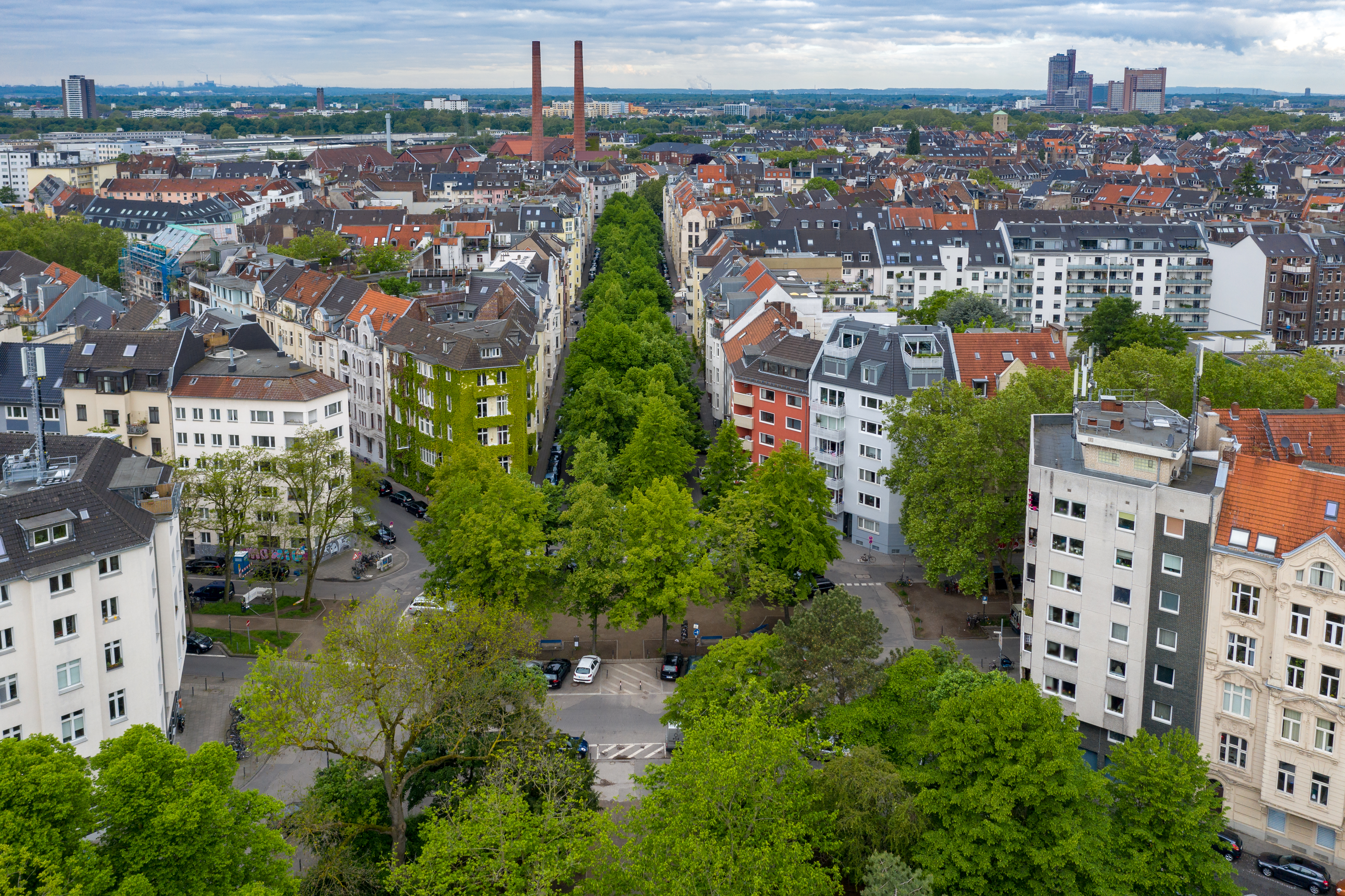 Blick über das Eierplätzchen in die Teutoburger Straße der Kölner Südstadt. Die Kameradrohne stieg dazu über dem Römerpark auf.